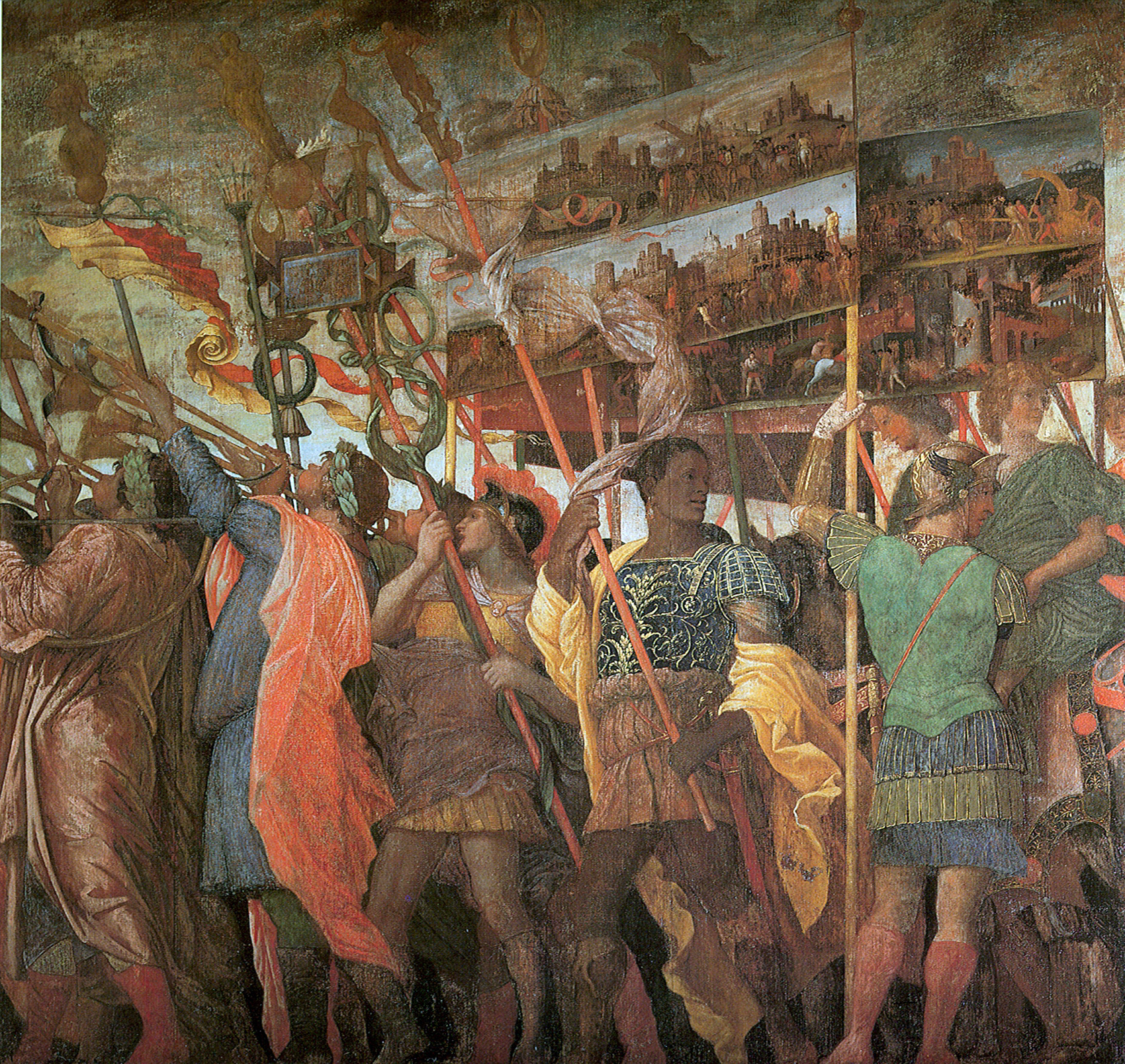 detail